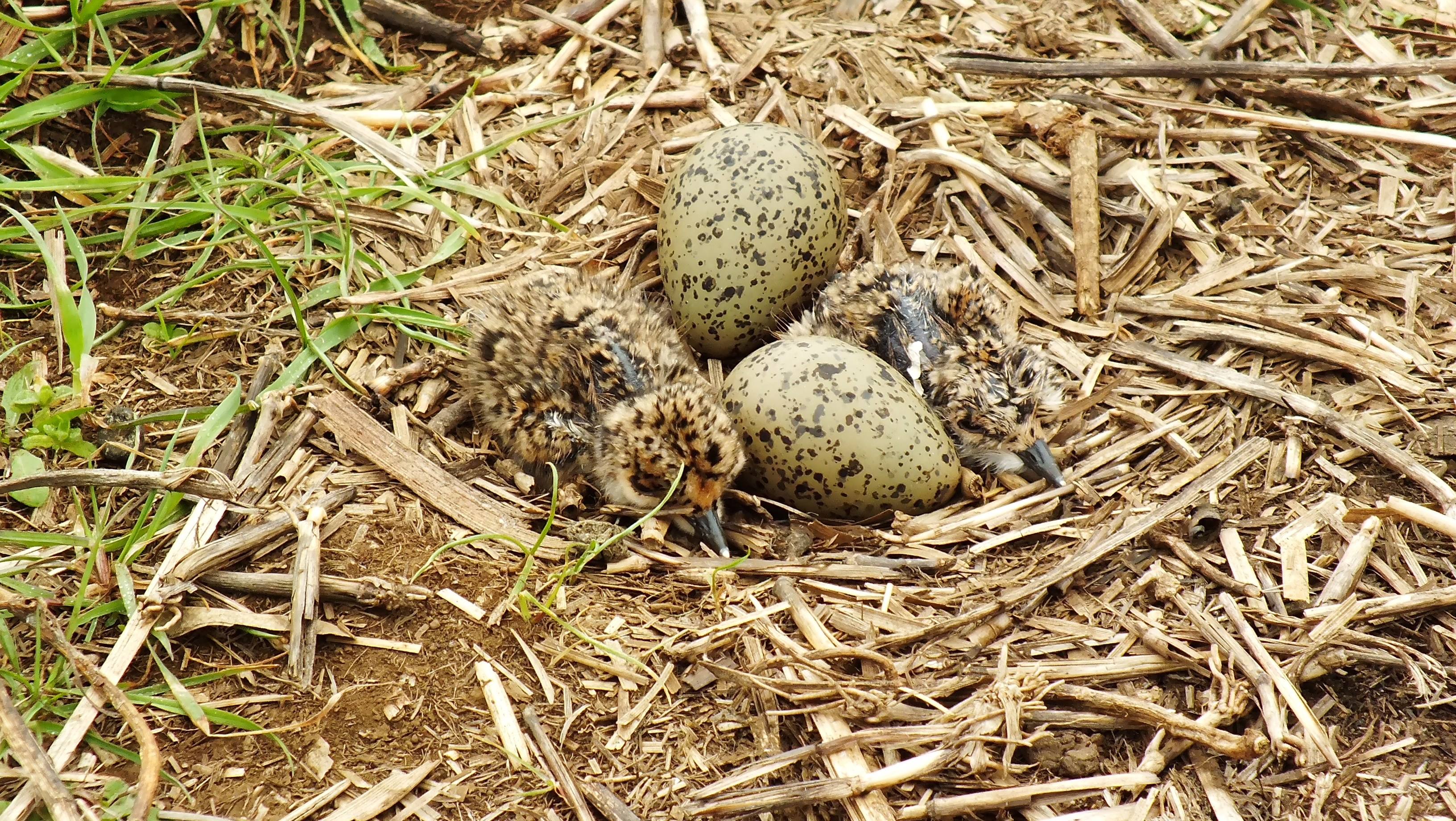 Huevos y polluelos de queltehue o traile en el campo cercano a Chillán, Chile